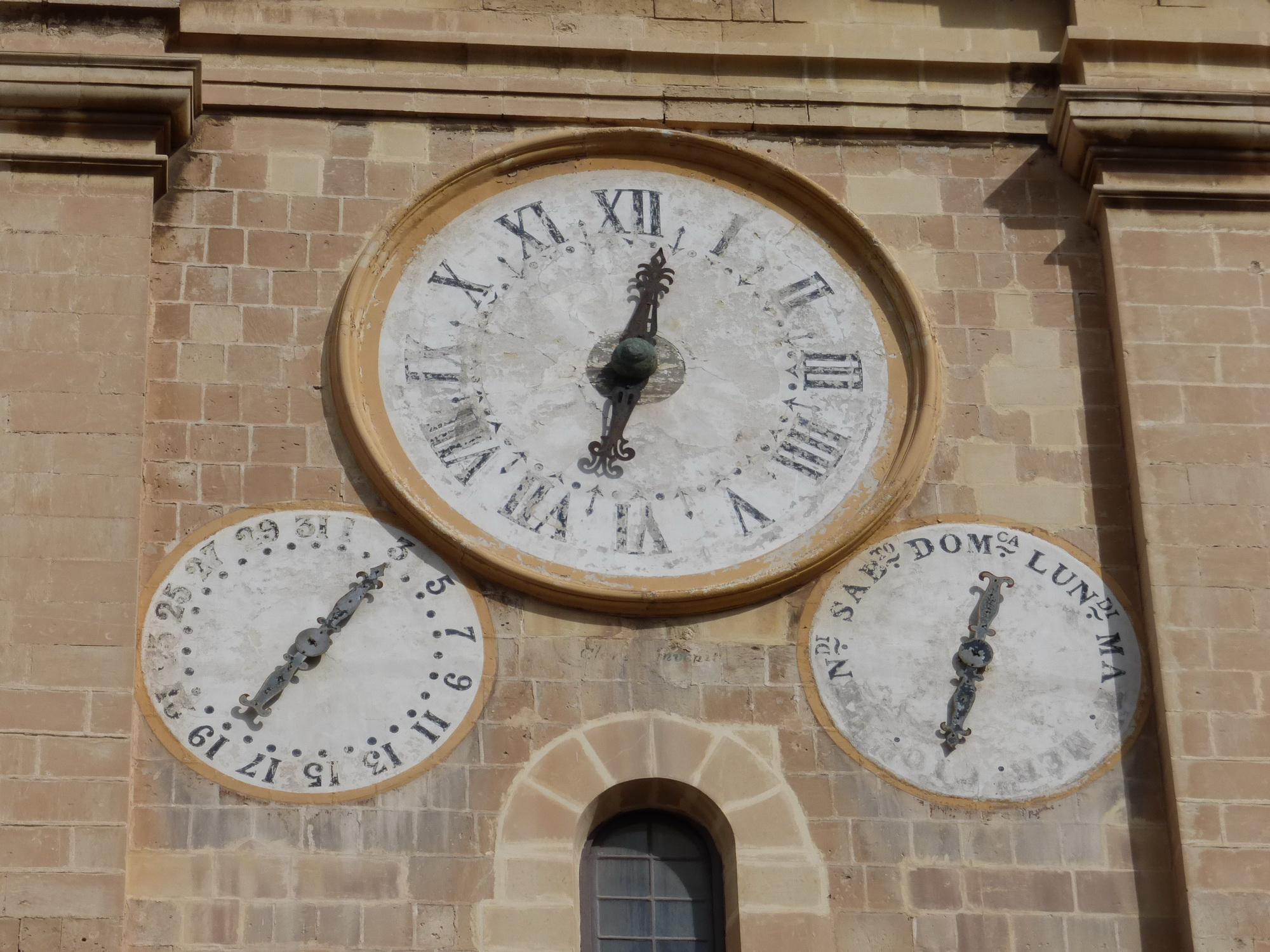 Zifferblätter am Südturm der Saint John's Co-Cathedral in Valletta (Malta). Das obere Zifferblatt zeigt die Zeit an (ohne Minutenzeiger), das links unten das Datum (ohne Monat) und das rechts unten den Wochentag